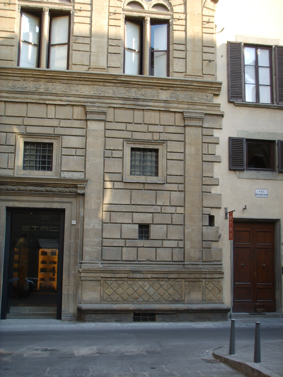 Palazzo rucellai, ordine architettonico pian terreno